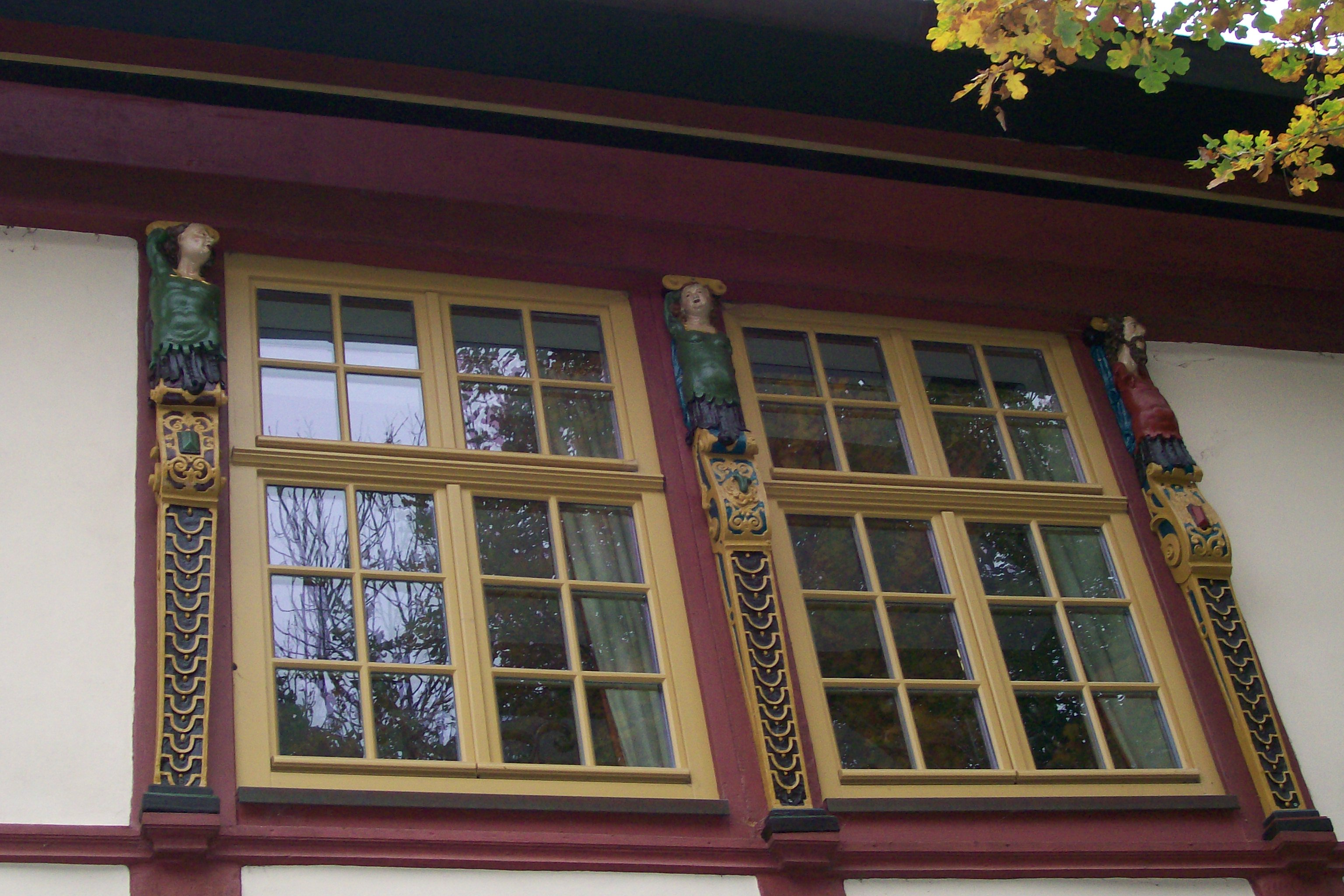 Jagdschlösschen in Bad Iburg, Niedersachsen, 1595 von Philipp Sigismund von Wolfenbüttel, Herzog zu Braunschweig und Lüneburg, Fürstbischof von Osnabrück erbaut, Schnitzereien des Osnabrücker Bildhauers Adam Stenelt